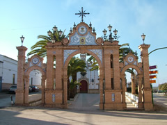 Arjonilla